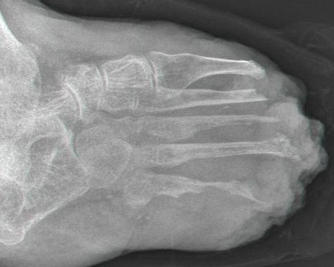 praeoperative Röntgenaufnahme vom rechten Fuß eines Leprakranken in Äquatorialguinea